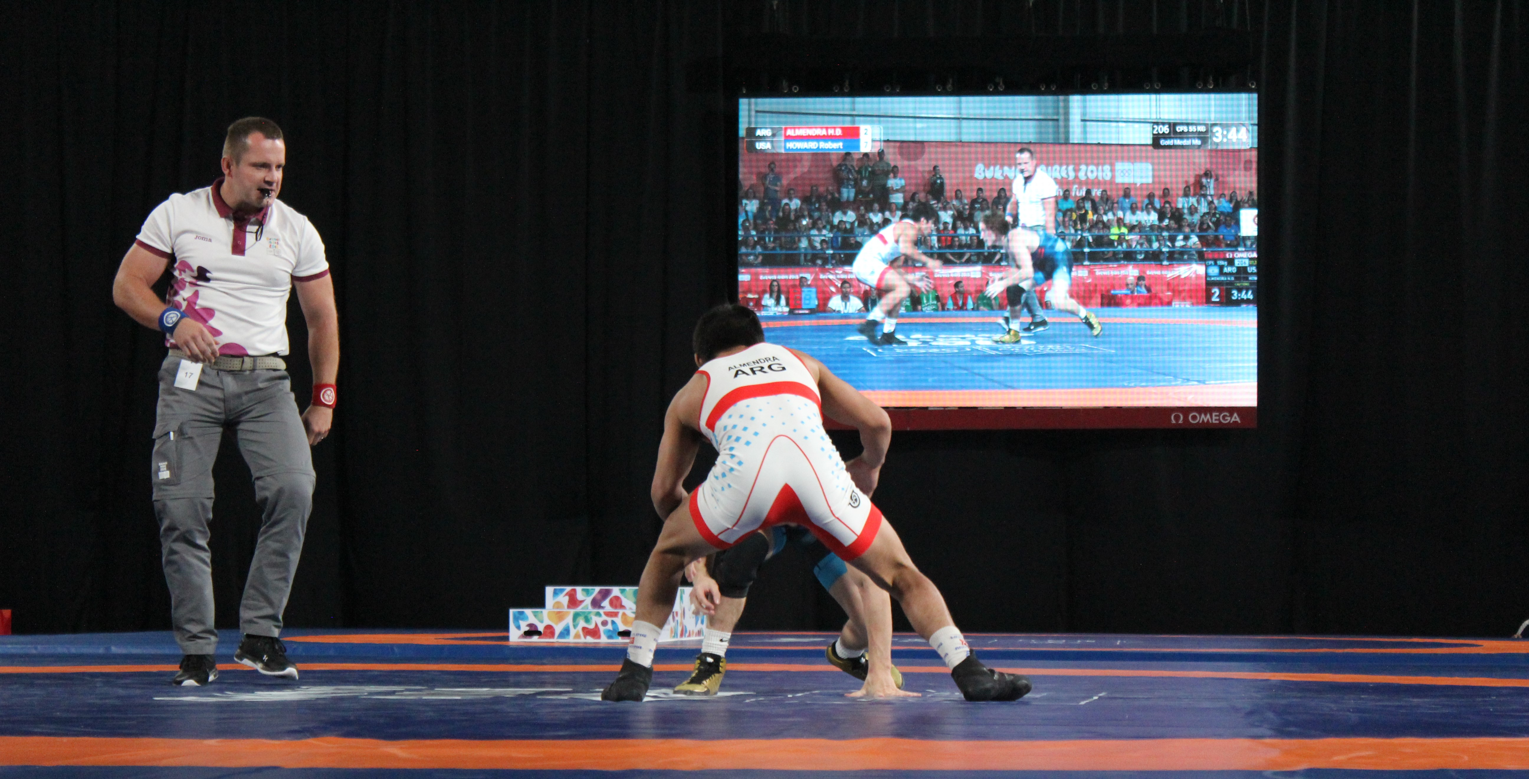 Lucha - estilo libre masculino. JJOO de la Juventud Buenos Aires 2018.